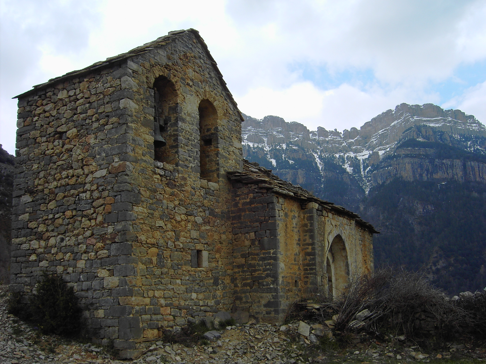 La iglesia de Sercué, en el municipio oscense de Fanlo. Las Sestrales presentando las últimas nieves primaverales como telón de fondo.